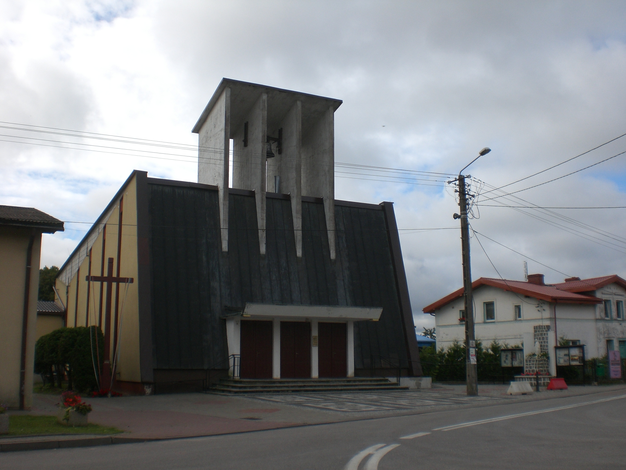 Łęczyce, ul. Kościelna 3 - rzymskokatolicki kościół parafialny p.w. św. Antoniego Padewskiego